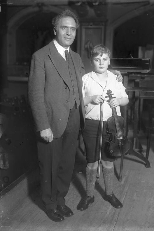 Der 14jährtige Wundergeiger Yehudin Menuhin gastiert in Berlin! Yehudin Menuhin mit Prof. Bruno Walter unter dessen Leitung er zum ersten Mal das Violin-Konzert No 7 von Mozart in Berlin spielt